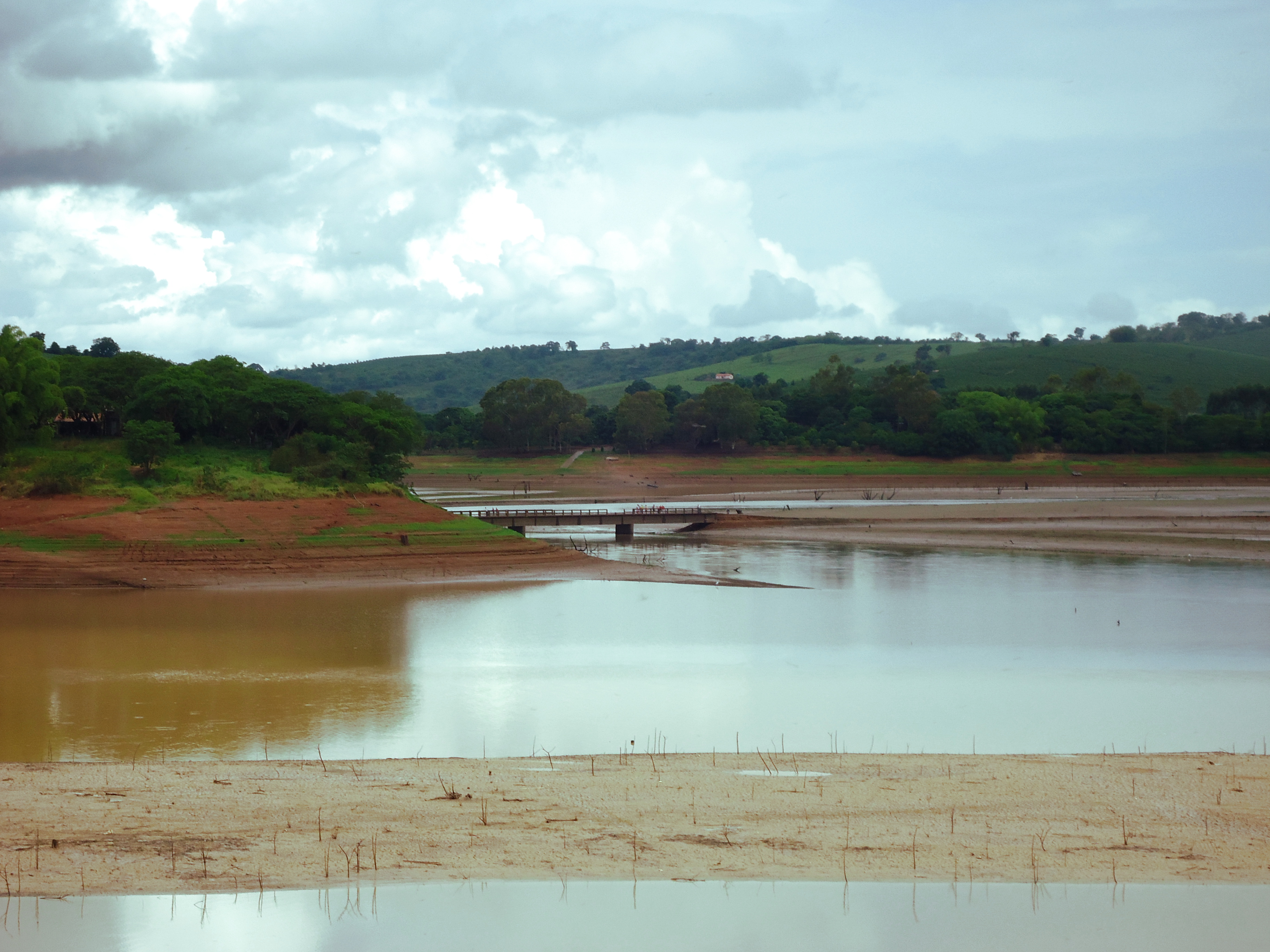 Quando o nível do lago de furnas está baixo é possível ver e caminhar sobre a ponte construída sobre o rio Verde antes da criação da represa e que ligava o município de Três Pontas a Paraguaçu.